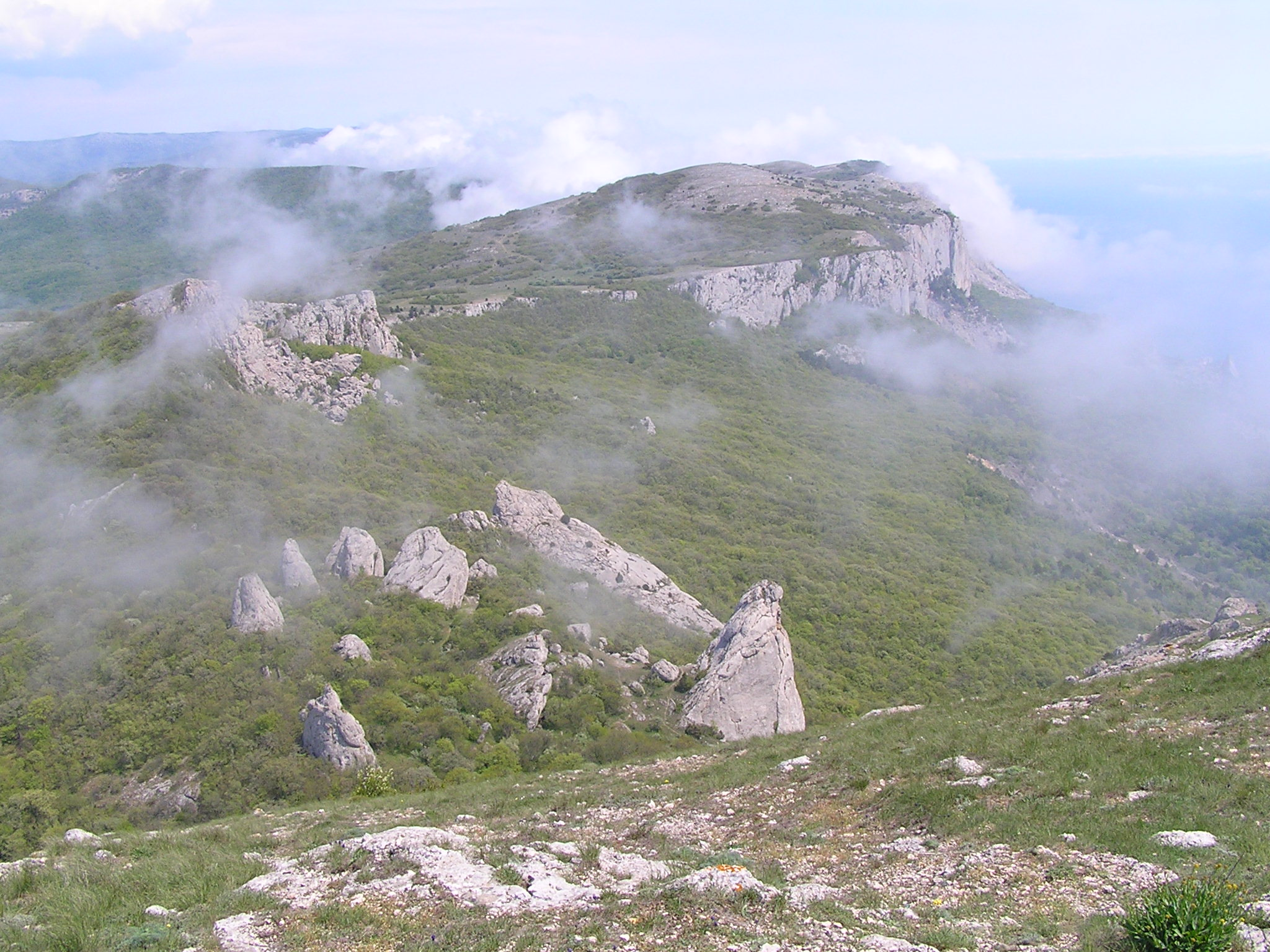 Заповідне урочище «Скелі Ласпі», Південний берег Криму, недалеко від Фороса у бік Севастополя.